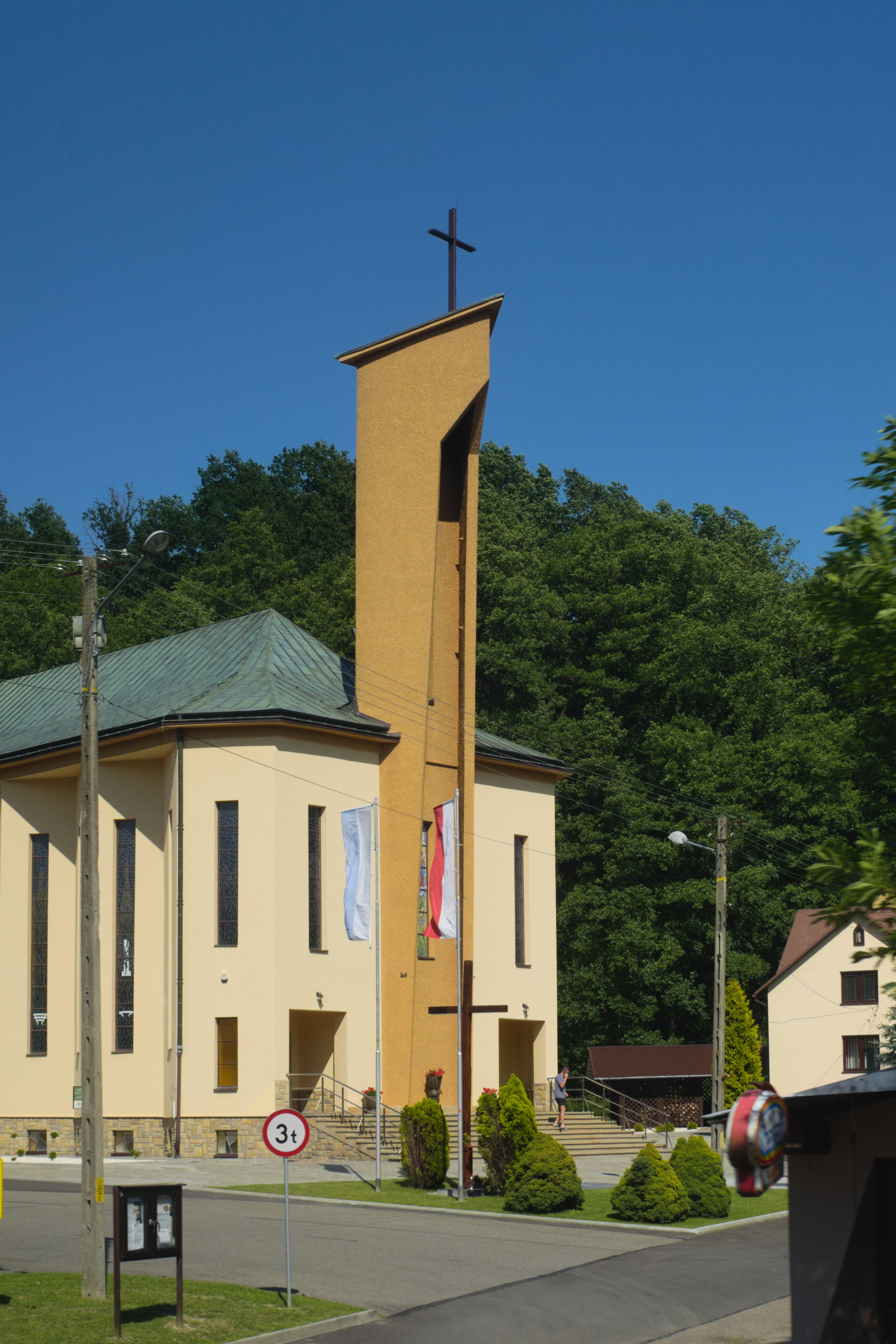 kościół Matki Bożej Wspomożenia Wiernych w Wyżnem, widok z okna autokaru